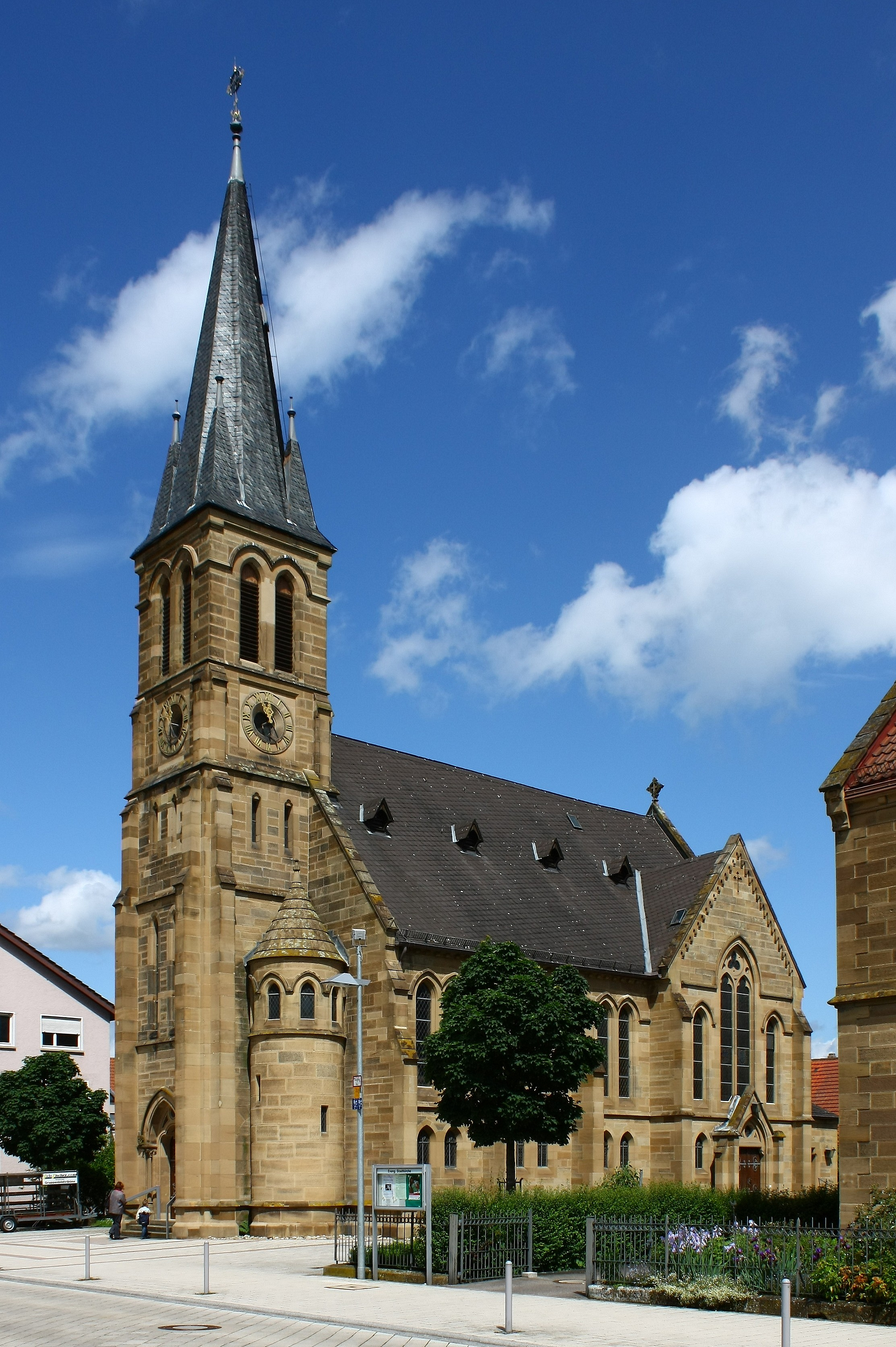 Die evangelische Stadtkirche von Neckarsulm, erbaut 1888